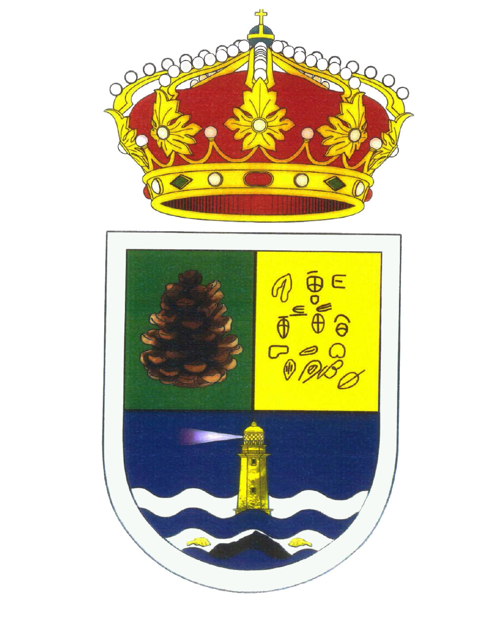 Escudo oficial del municipio de El Pinar de El Hierro.